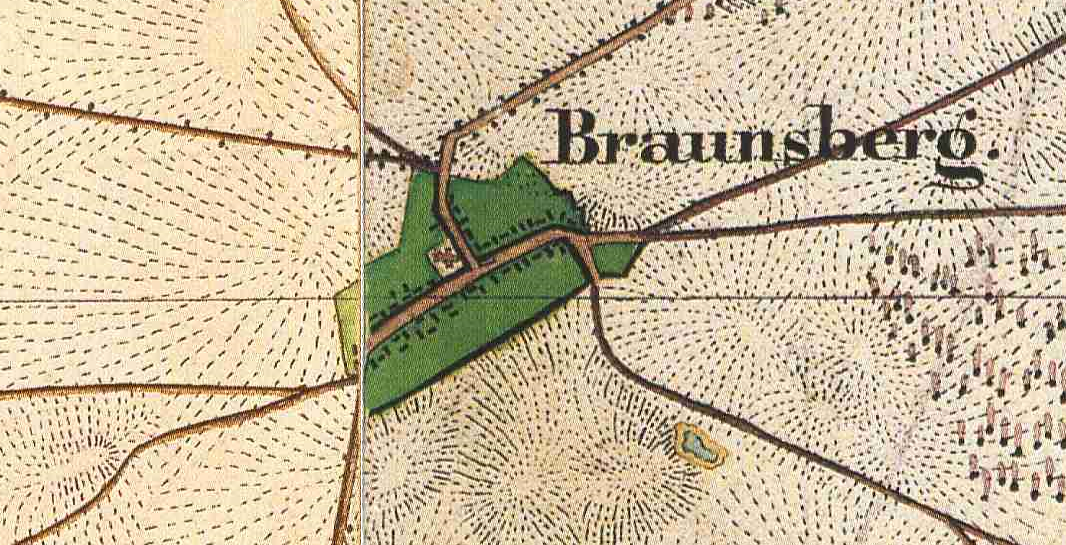 Braunsberg, Ortsteil der Stadt Rheinsberg, Lkr. Ostprignitz-Ruppin, Brandenburg, auf den Urmesstischblätter 2942 (Zühlen) 2943 (Rheinsberg) von 1825, kombiiert